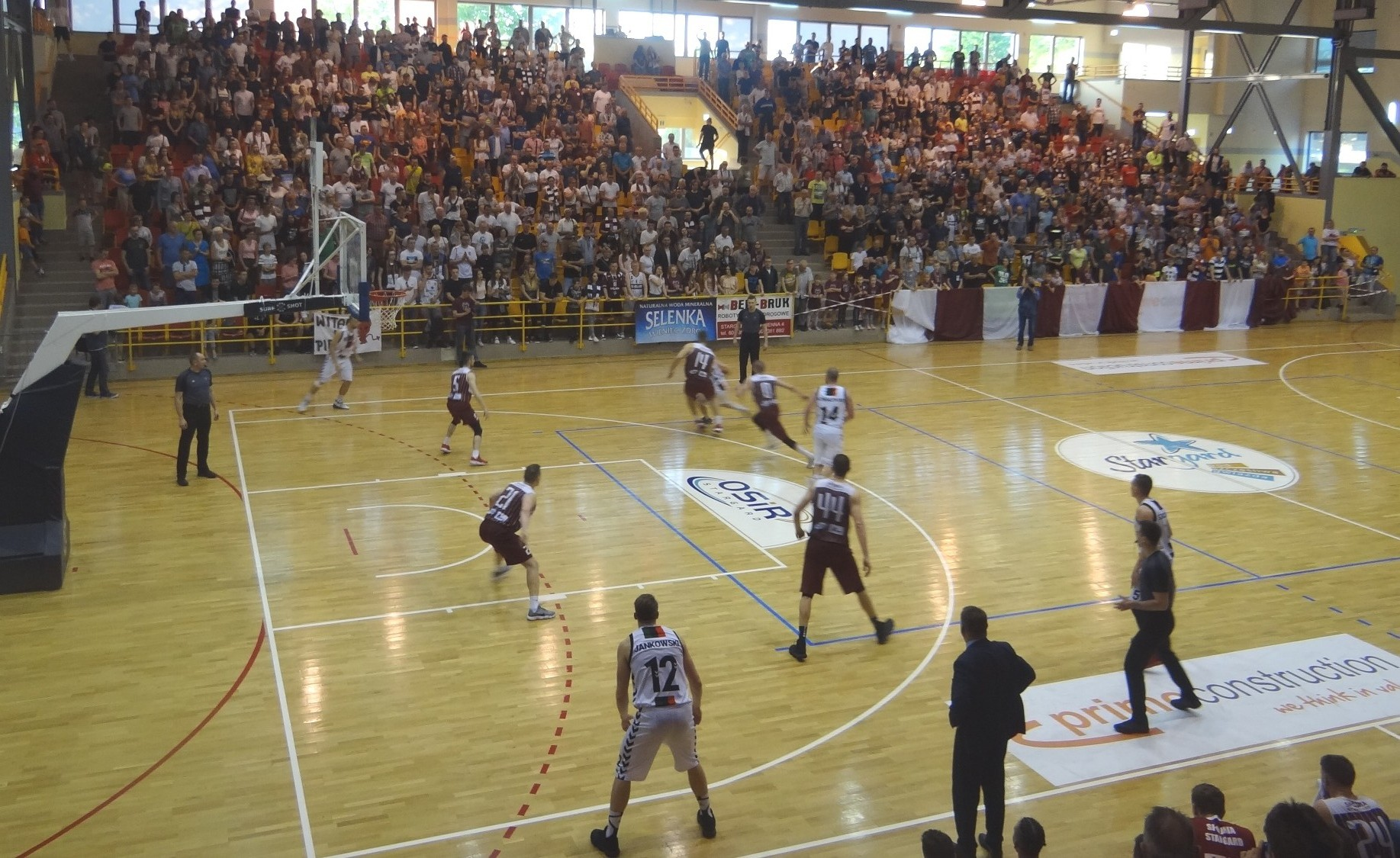 Mecz Spójnia Stargard - GKS Tychy (28.04.2018)